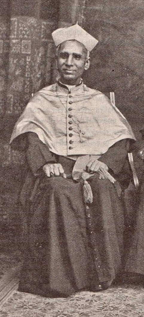 Mar Aloysius Pazheparambil, Apostolischer Vikar von Ernakulam, Indien